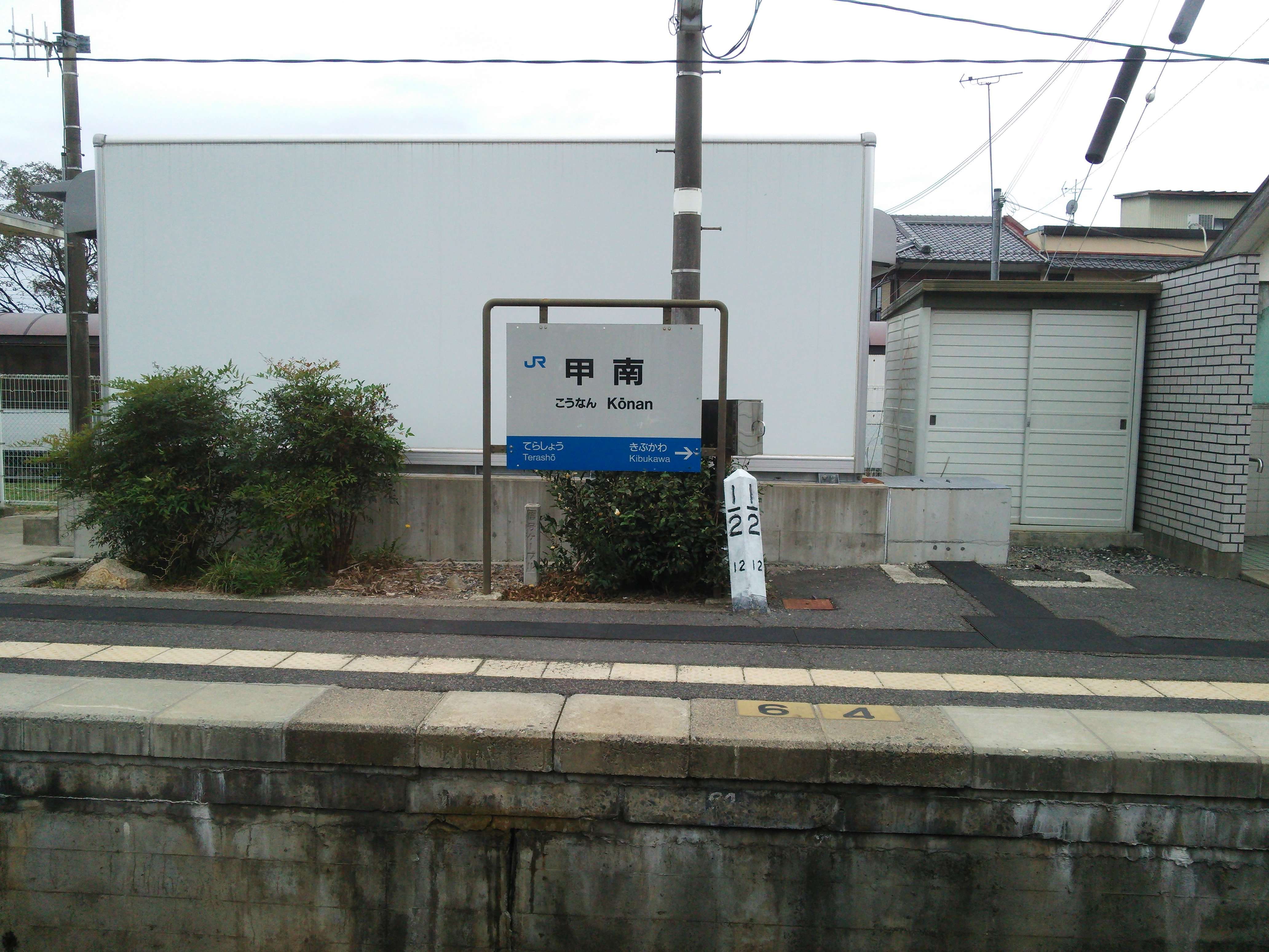 Konancho Fukawa, Koka, Shiga Prefecture 520-3322, Japan